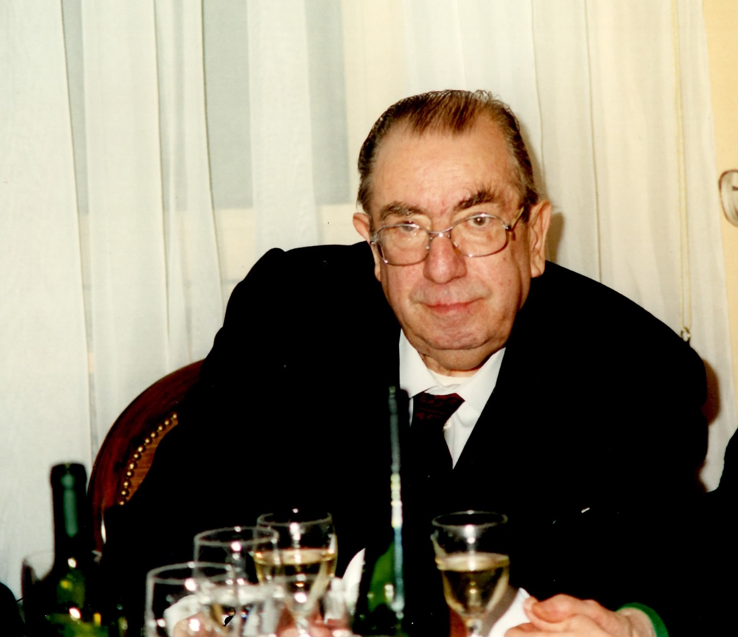 L'onorevole Gualtiero Driussi